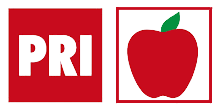 Emblema del Partido Regionalista de los Independientes (PRI).